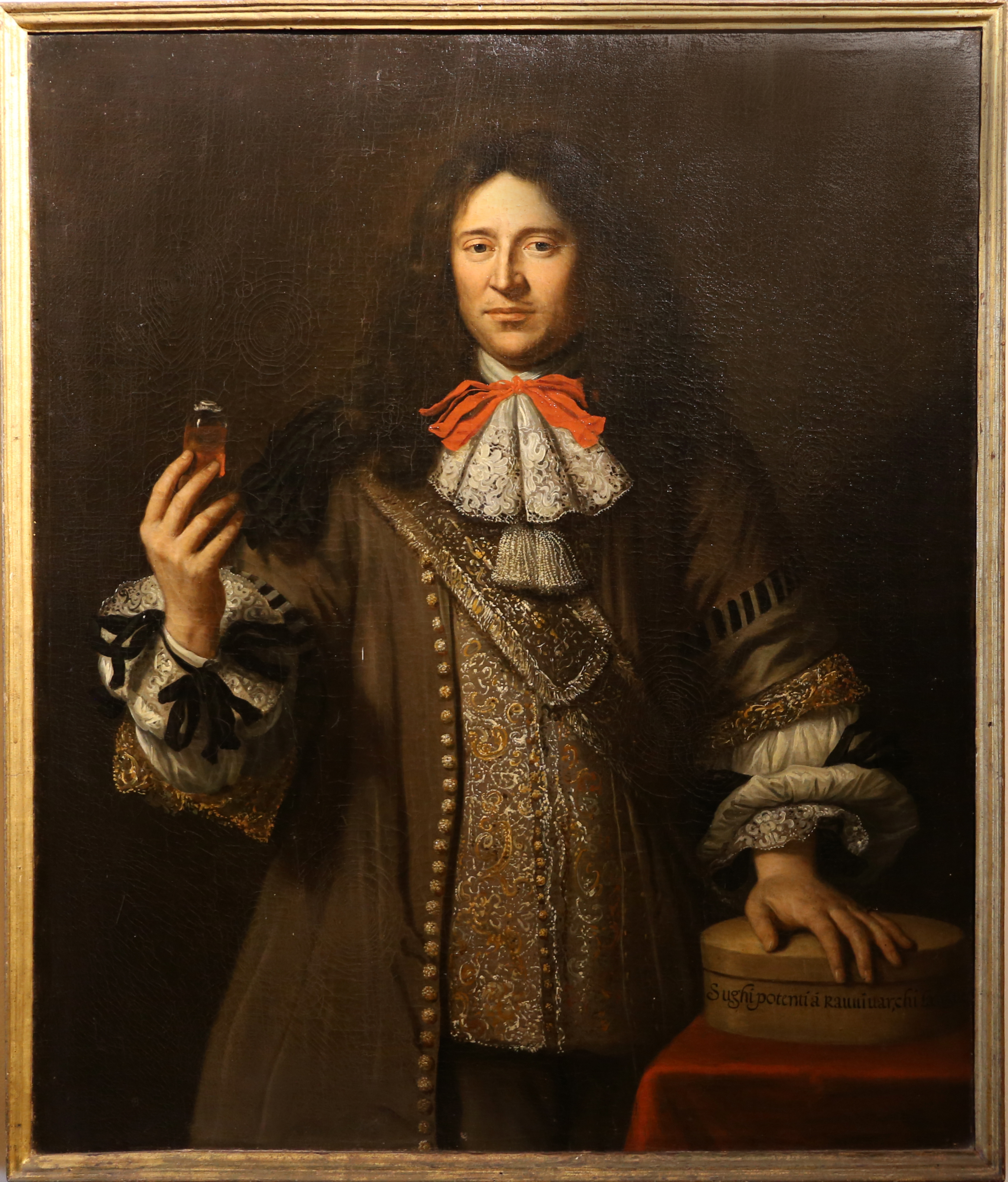 Museo civico di Montepulciano This is a photo of a monument which is part of cultural heritage of Italy.